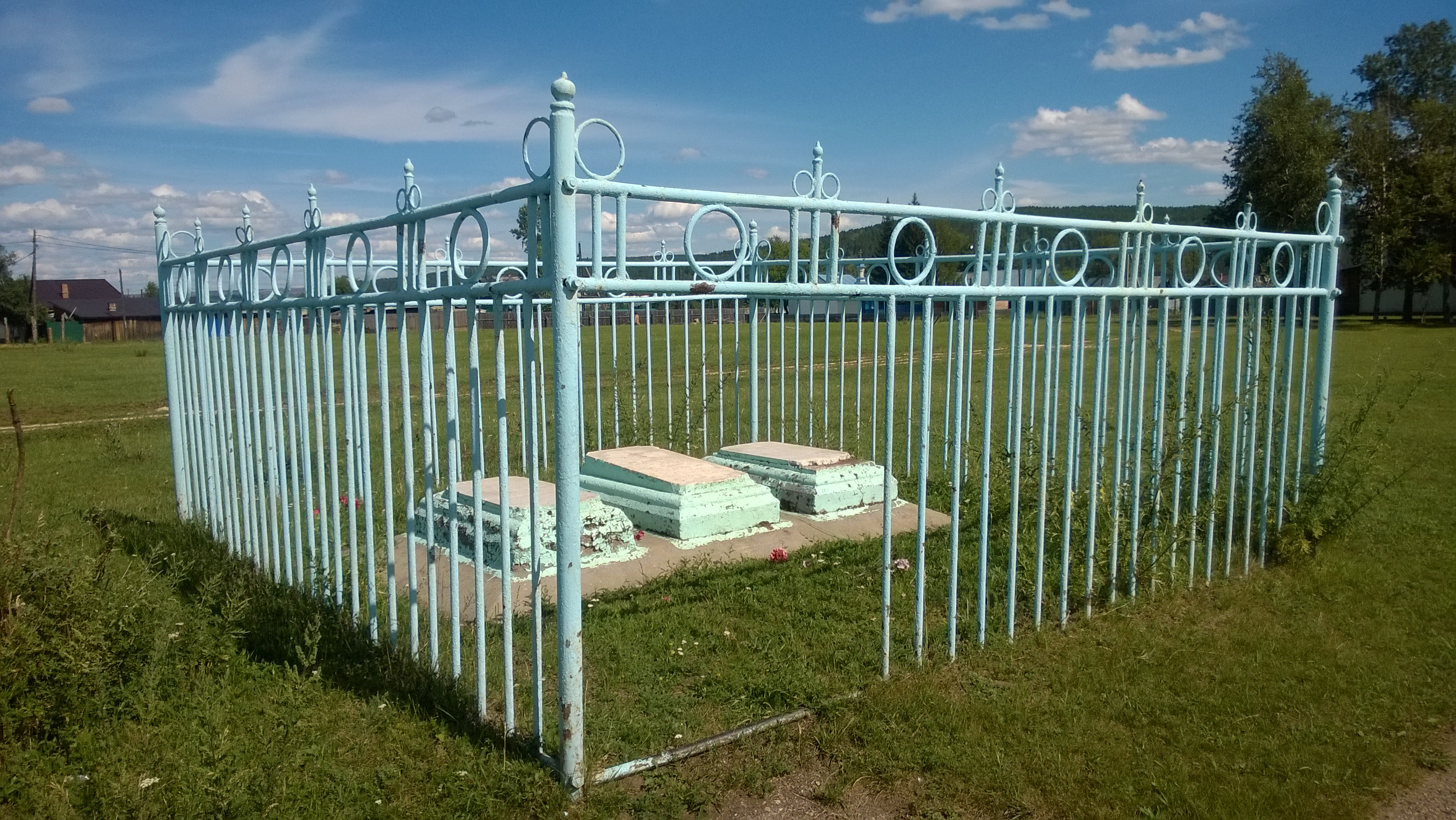 Могила Раевского В.Ф. (1795-1872), декабриста: улица Руслана Хомколова, у Дома культуры, Олонки, Боханский район, Иркутская область